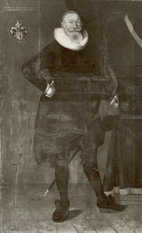 Porträt Abraham von Werdt